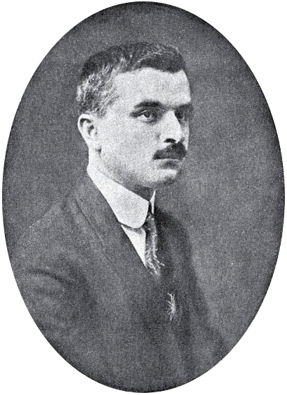 Никола Милев.